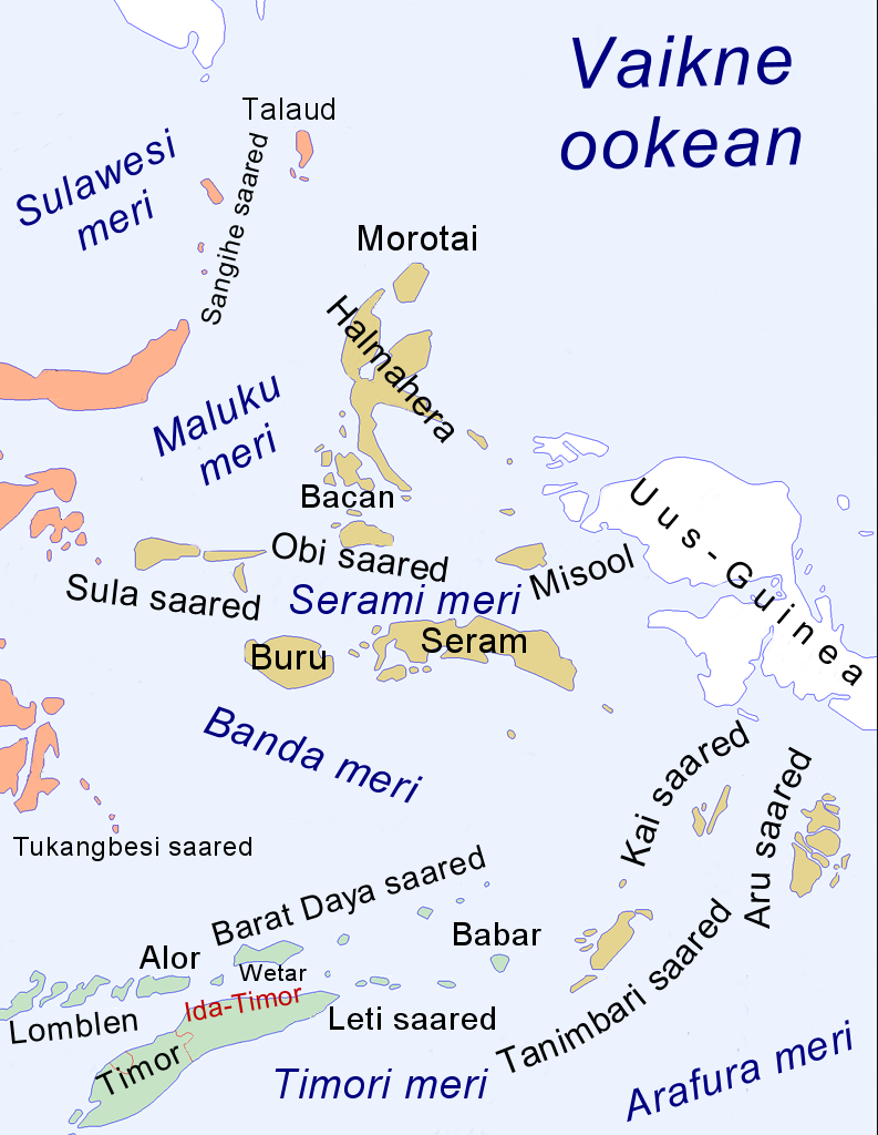 Maluku saared